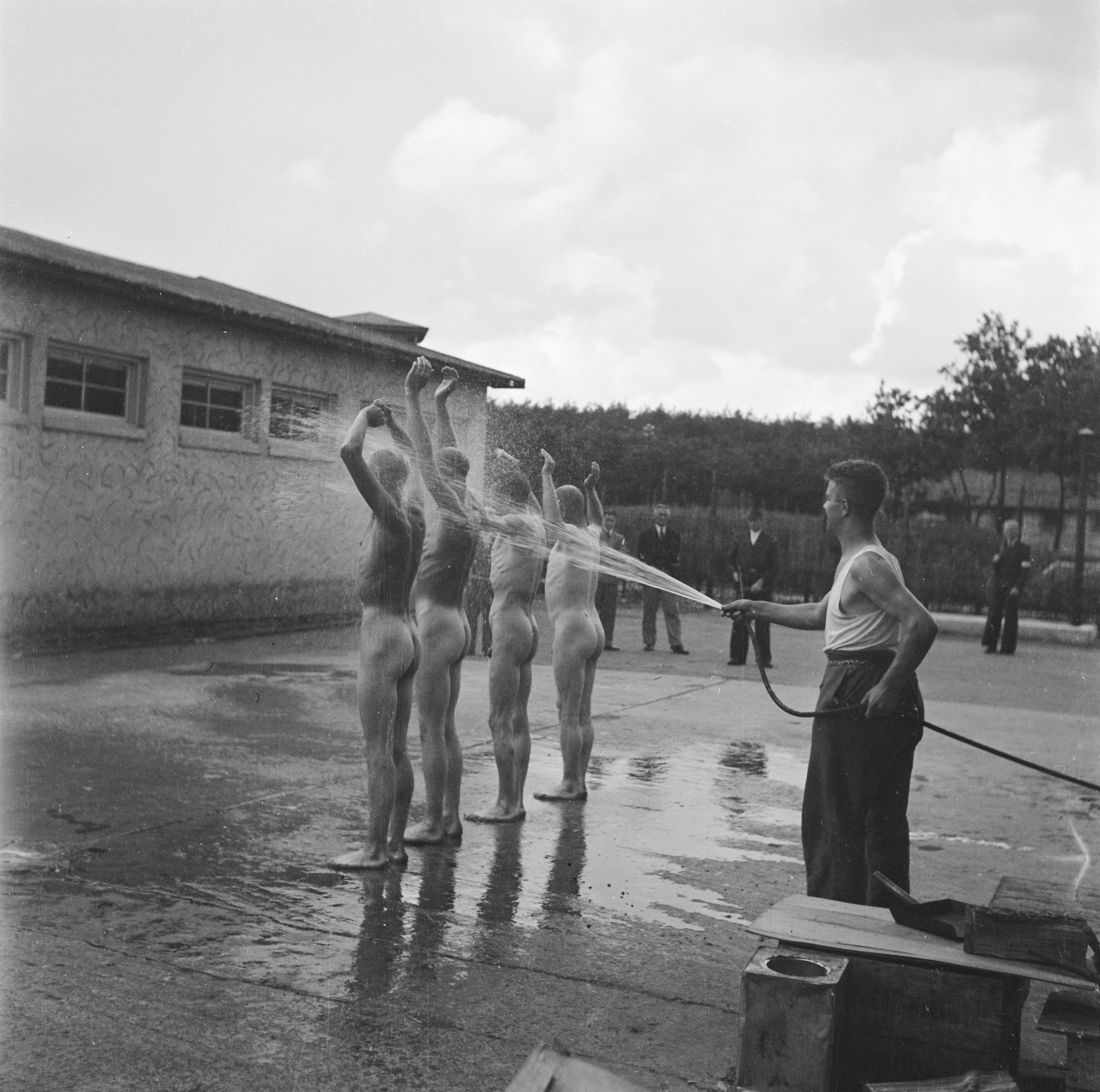 Kamp Amersfoort, interneringskamp voor oorlogsmisdadigers en collaborateurs Vier naakte mannen worden met een tuinslang natgespoten onder het oog van bewakers